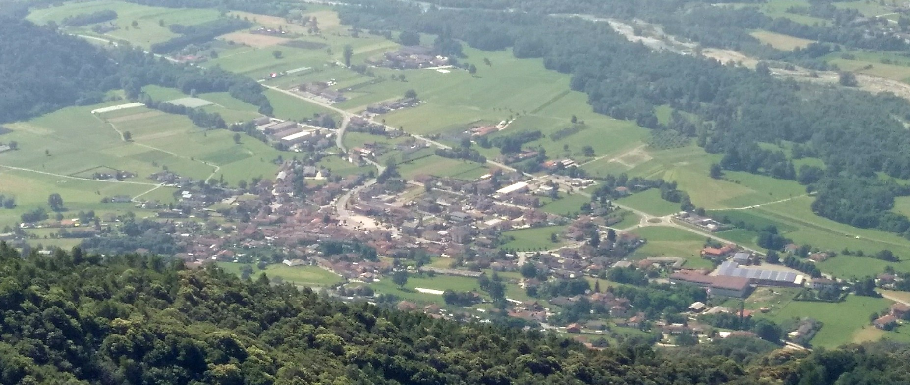 Rifreddo (CN): panorama dal Rifugio Mulatero